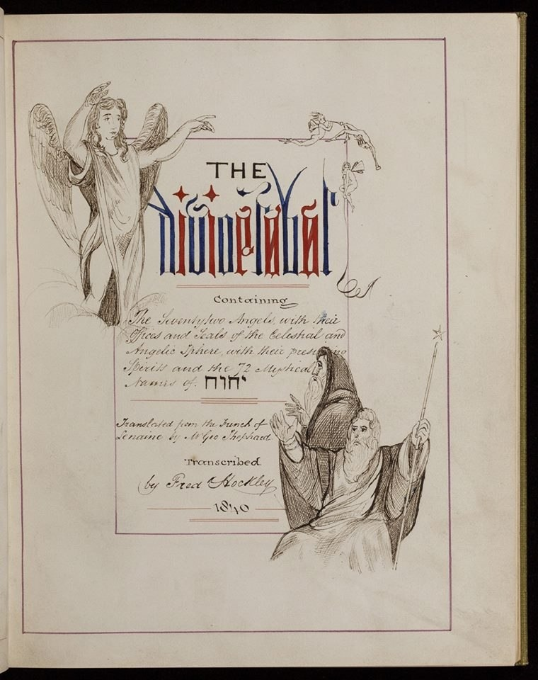 Ленен. Божественная каббала, манускрипт Ф.Хокли